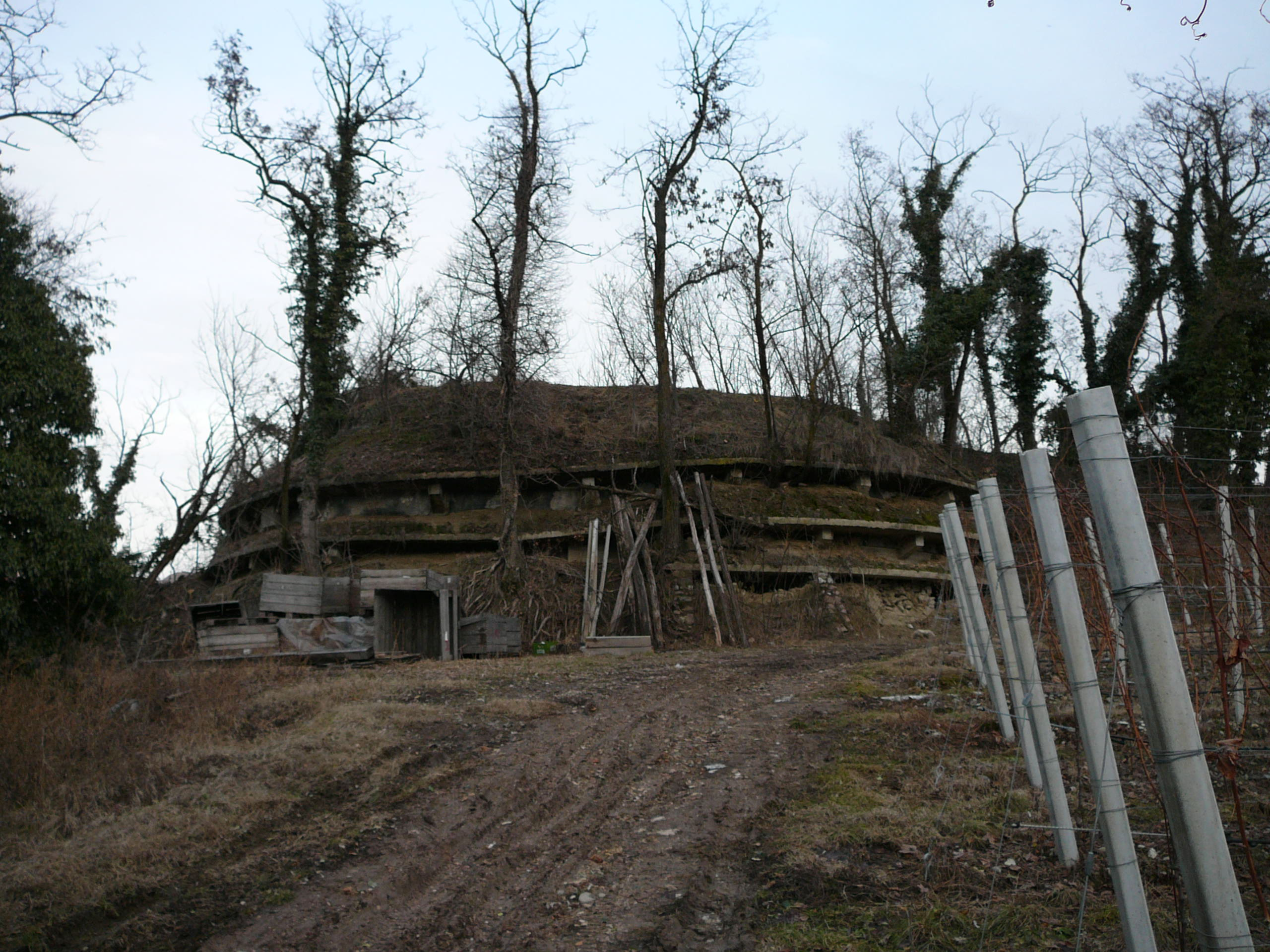 Opera 36 Bolzano